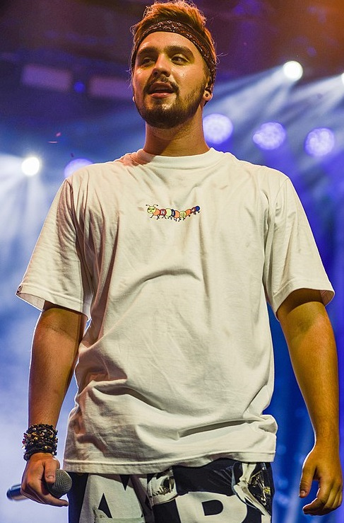 Luan Santana no Citibank Hall, 2018